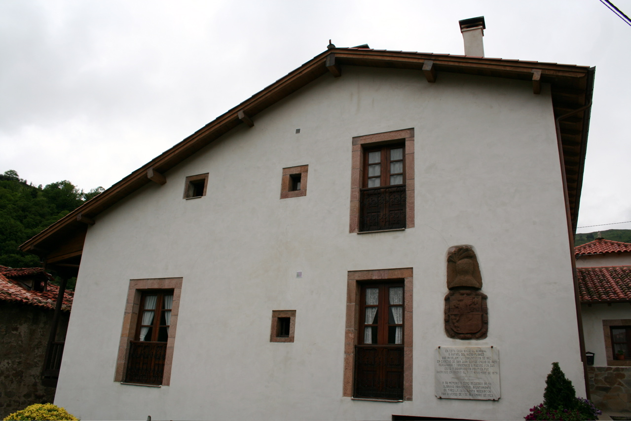 Casa natal de Rafael del Riego en Tuña, en el concejo de Tineo en Asturias.